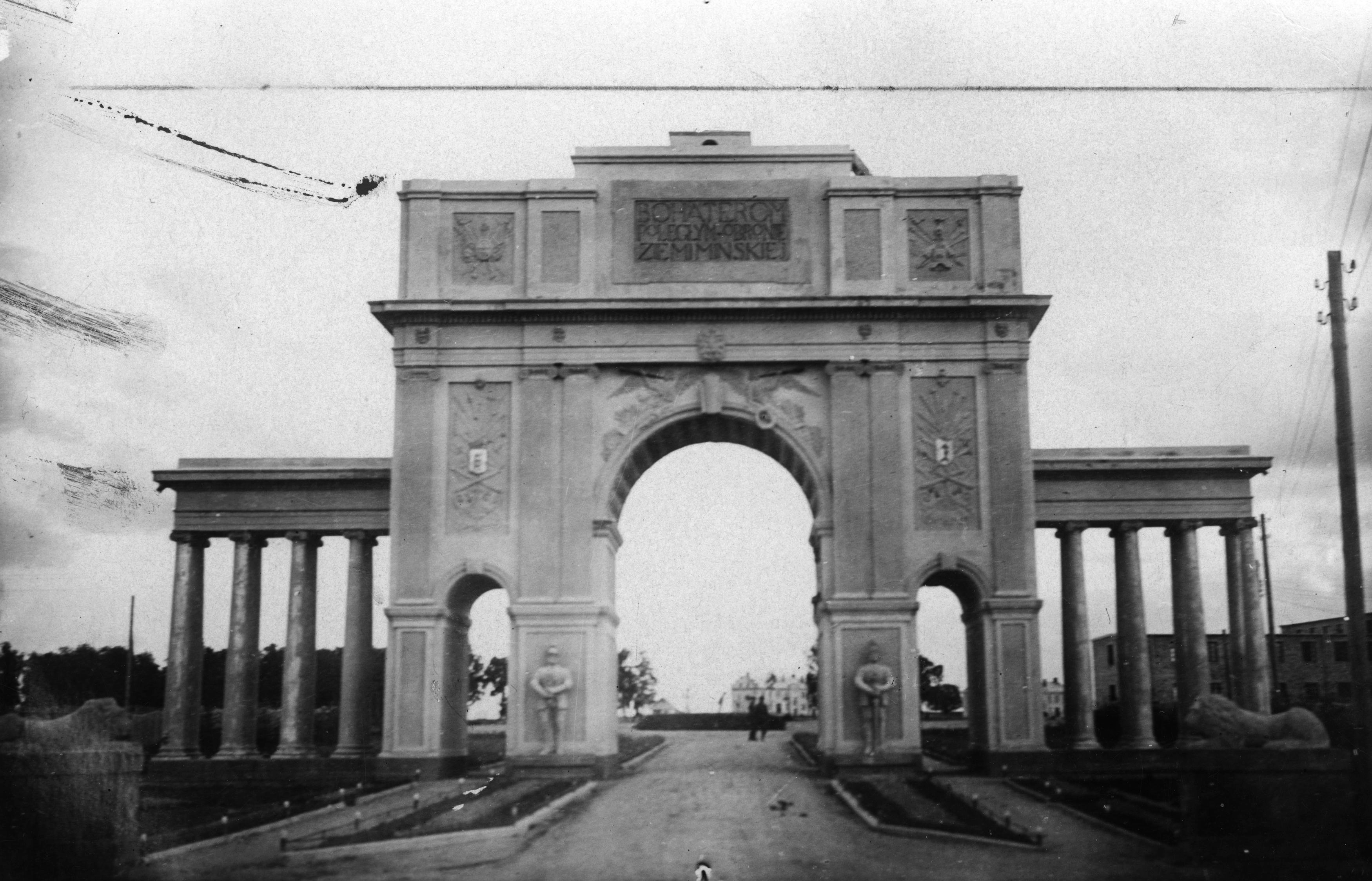 Беларуская (тарашкевіца): Маладэчна (Maładečna), Гелянова (Hielanova). Трыюмфальная брама